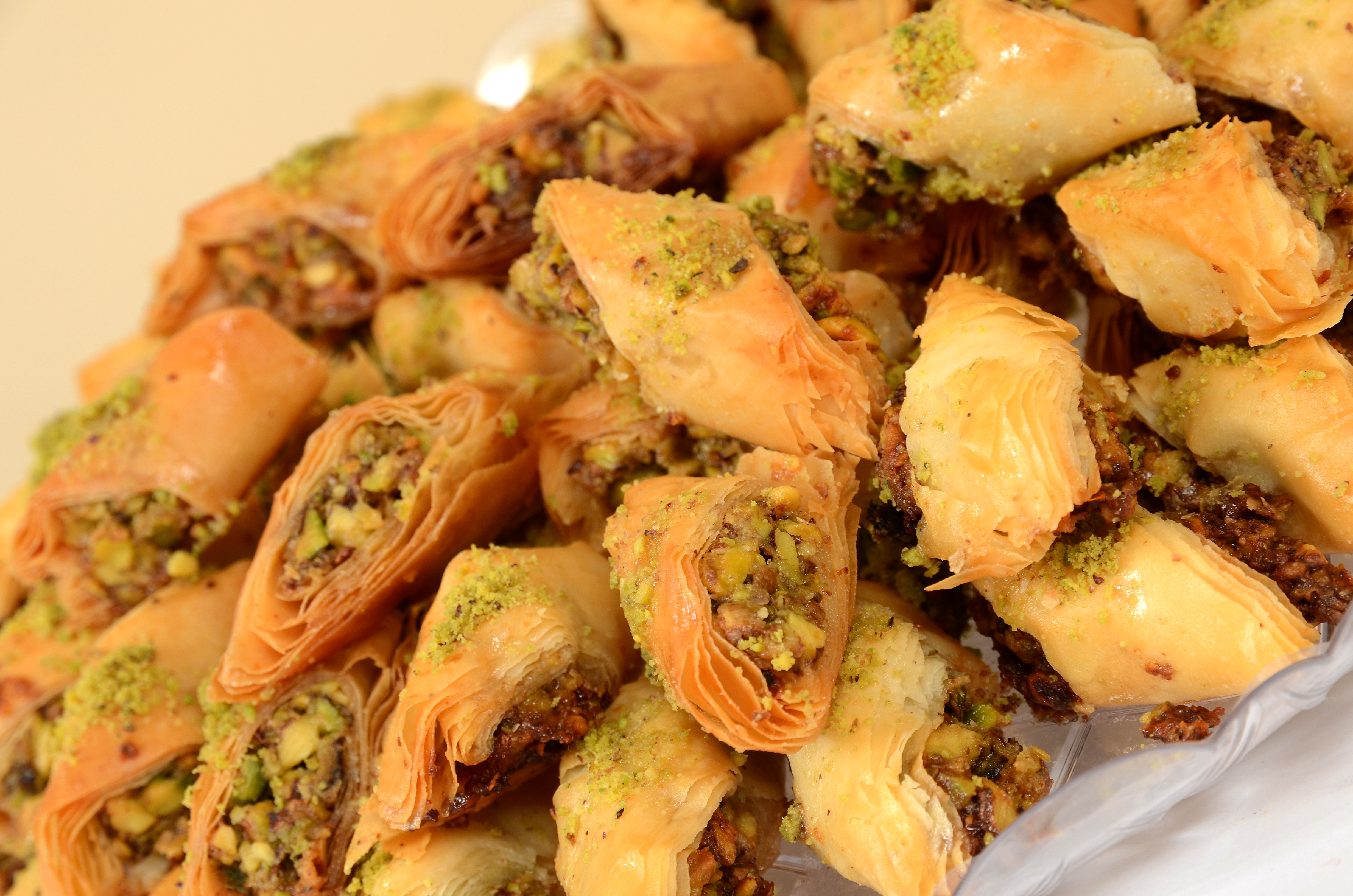 صورة لحلوى البقلاوة بالمكسرات مرتصة في طبق للتقديم